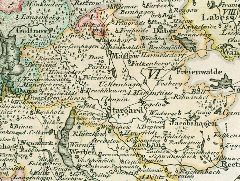 Ausschnitt aus "Landkarte des Herzogtums Vor- und Hinterpommern aus dem Jahr 1794"